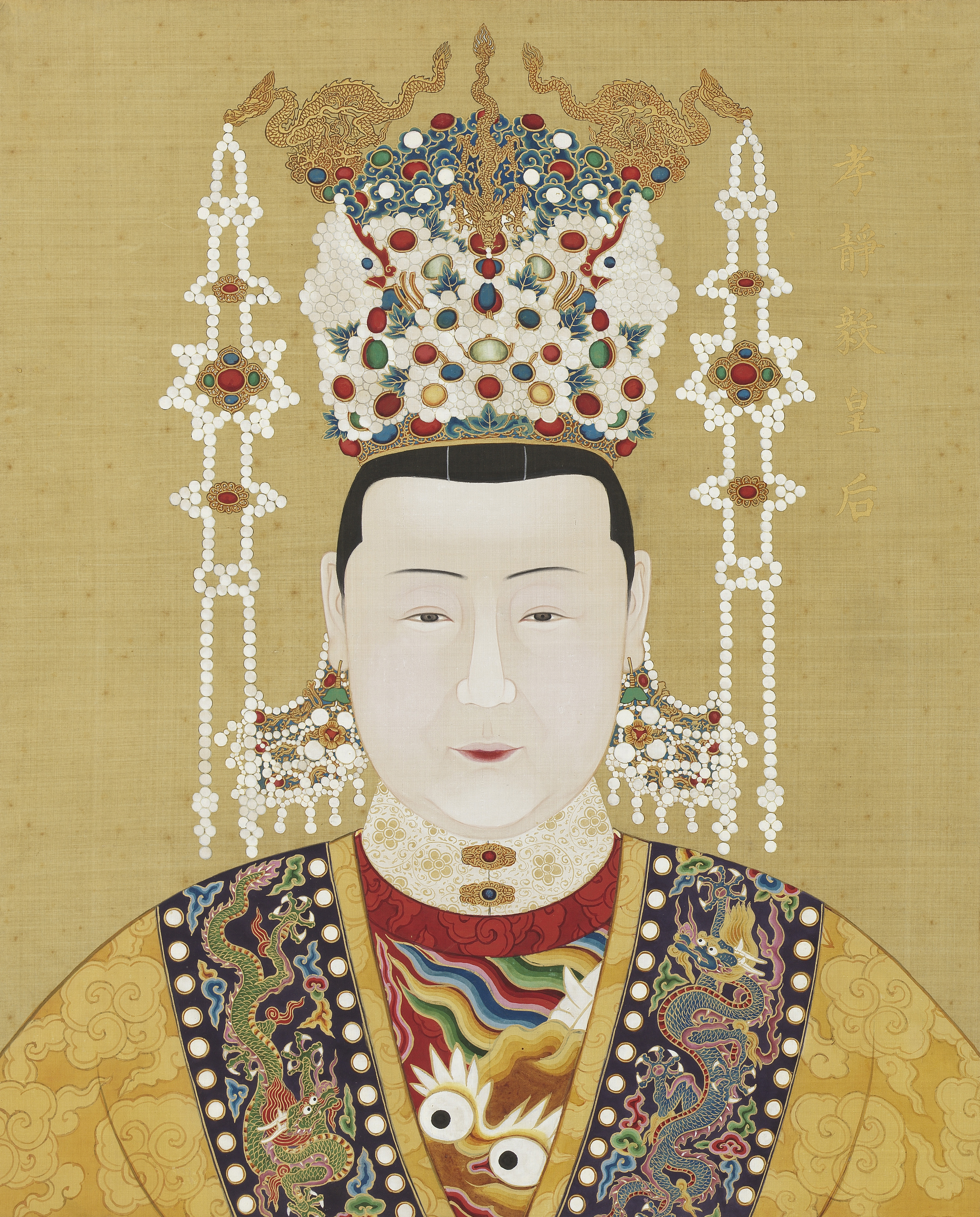 中文（中国大陆）: 作者已经去世超过200年，作品已经进入公有领域。